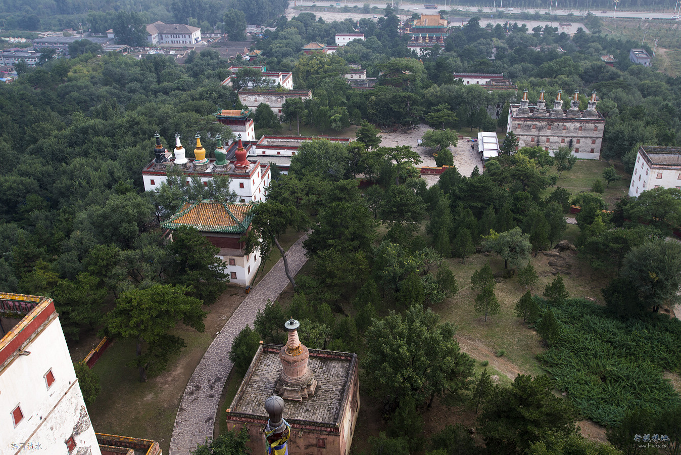 中文（中国大陆）: 下望整个寺院，碉房错落，梵塔林立